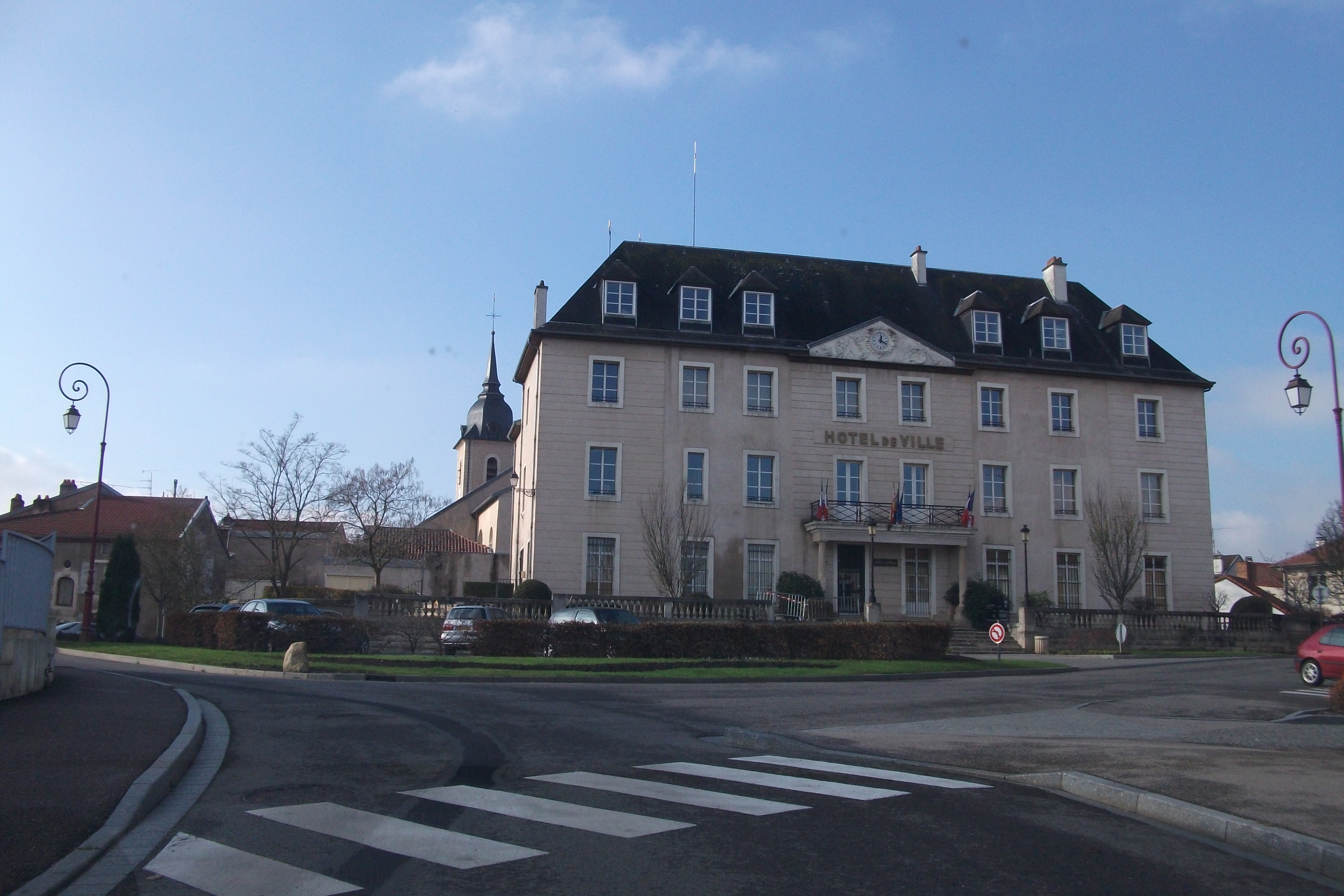 Hûtel de ville de Champigneulles.